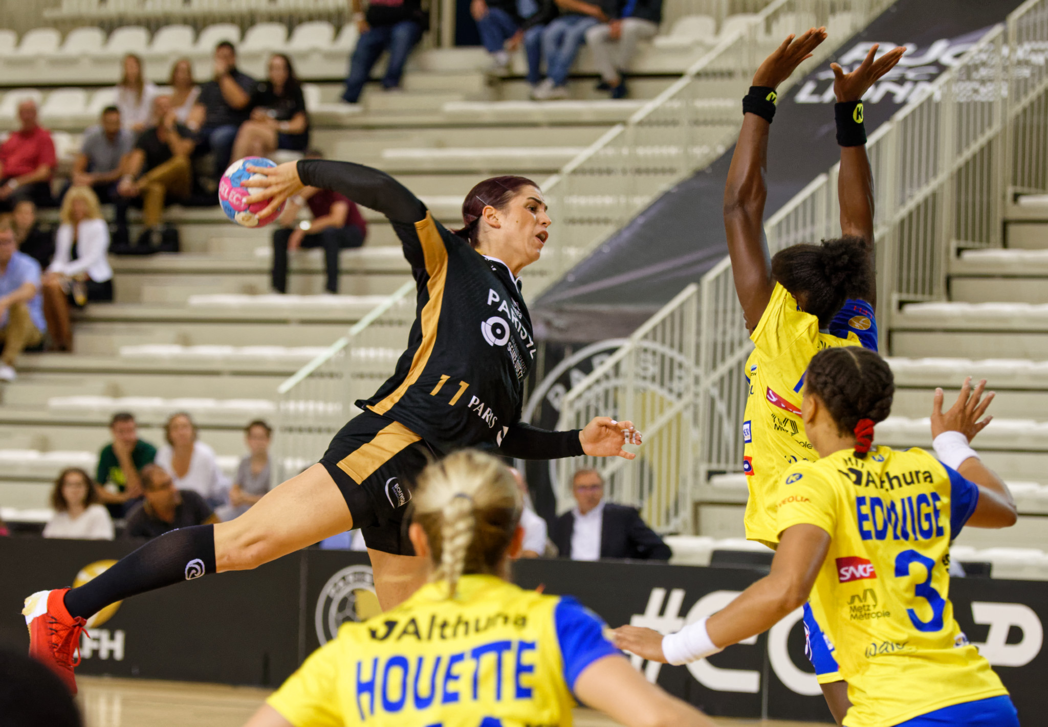 Rencontre de la 5e journée de la LFH entre Paris 92 et Metz Handball. A Issy-Les-Moulineaux, le 16 septembre 2018.